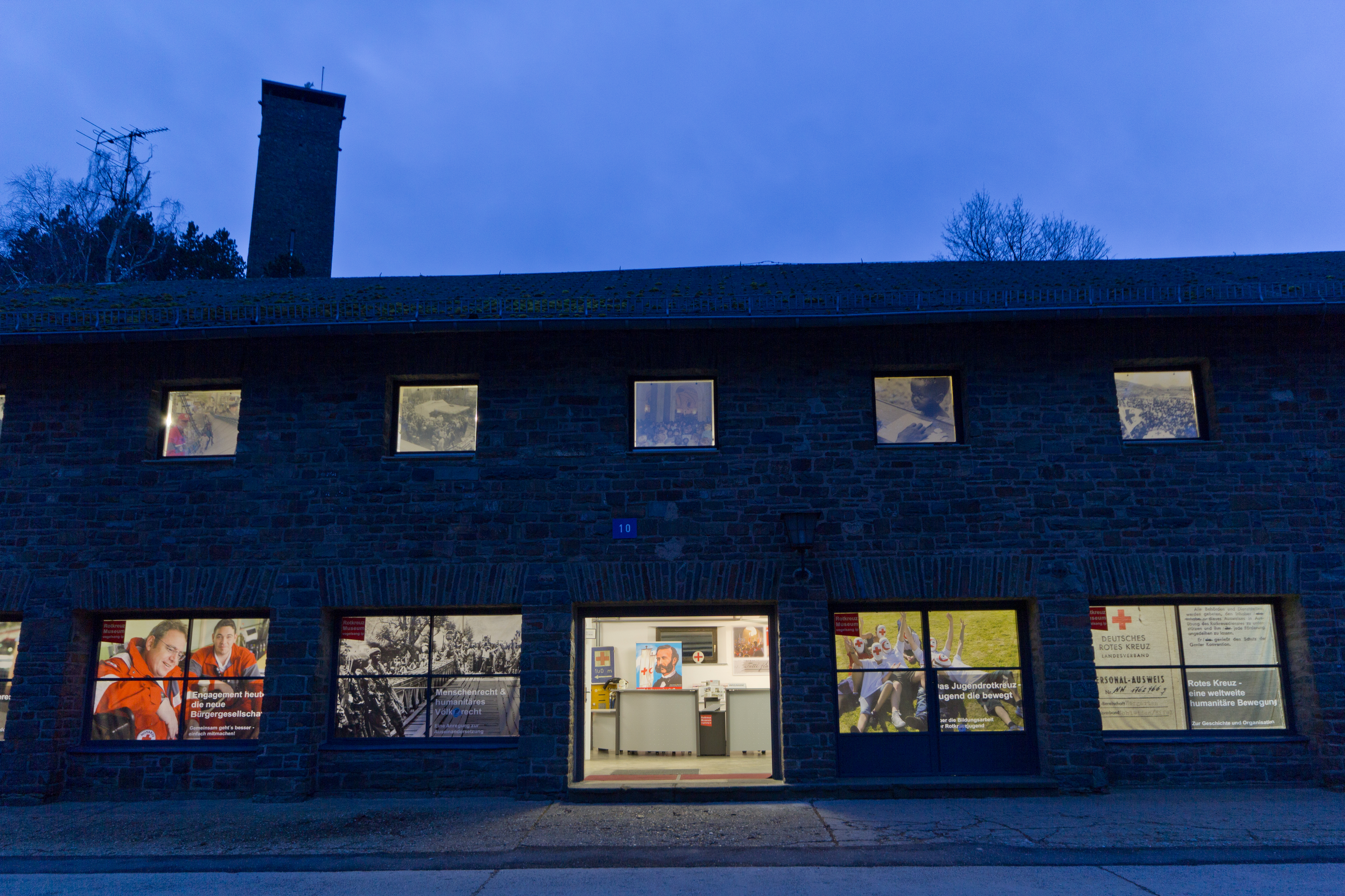 Das beleuchtete Museum am Abend, Fensterbilder.